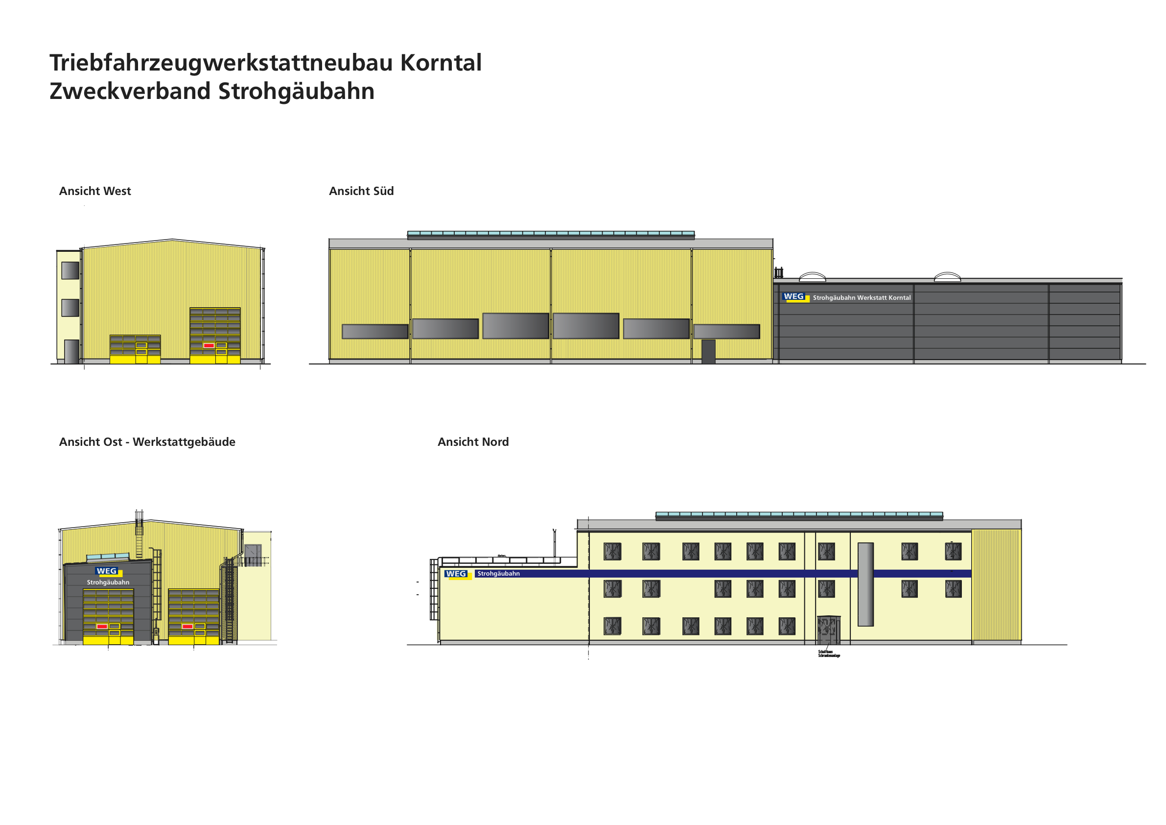 Werkstattneubau der Strohgäubahn